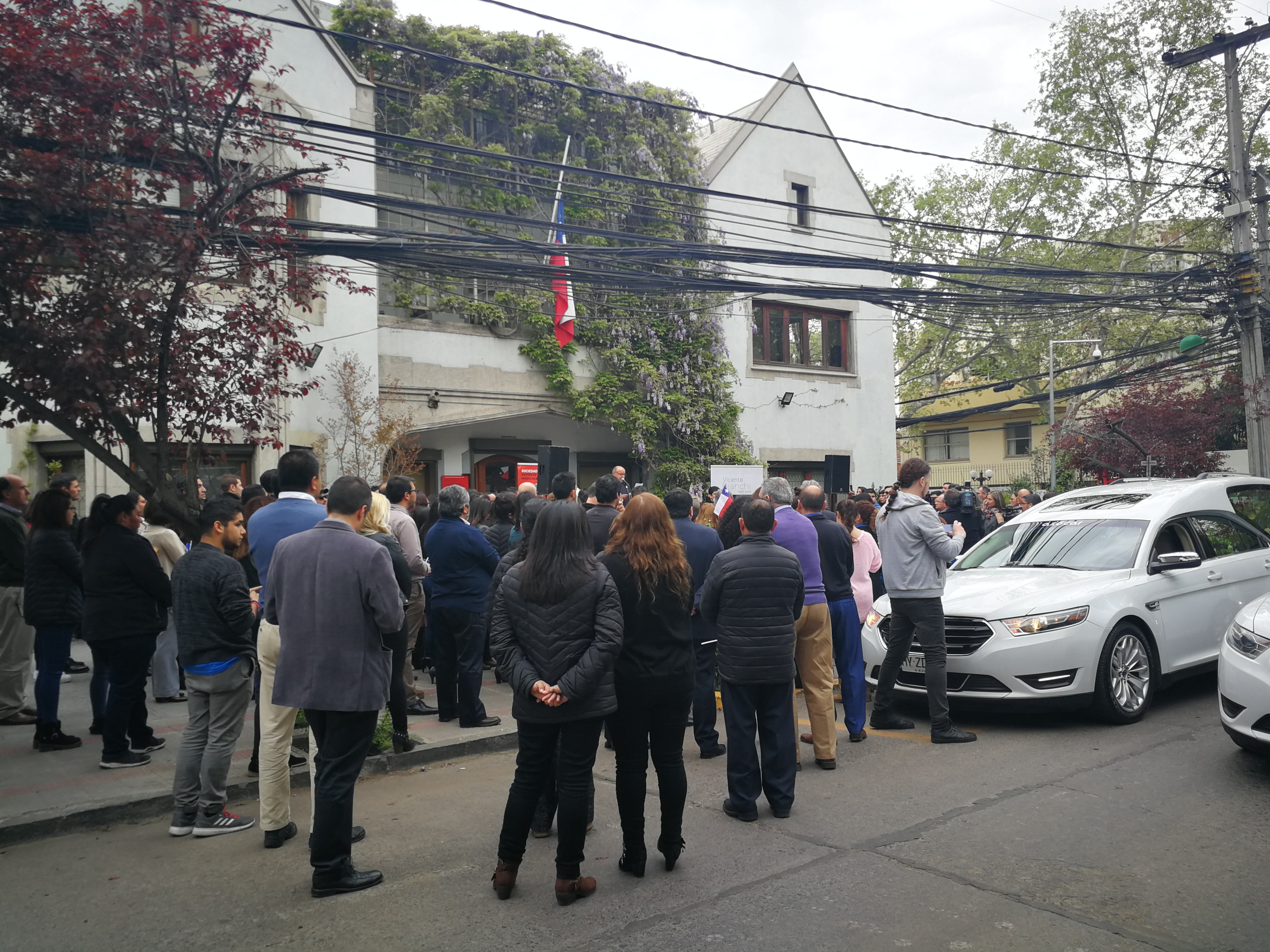 Homenaje a Vicente Bianchi frente a la sede de la SCD.